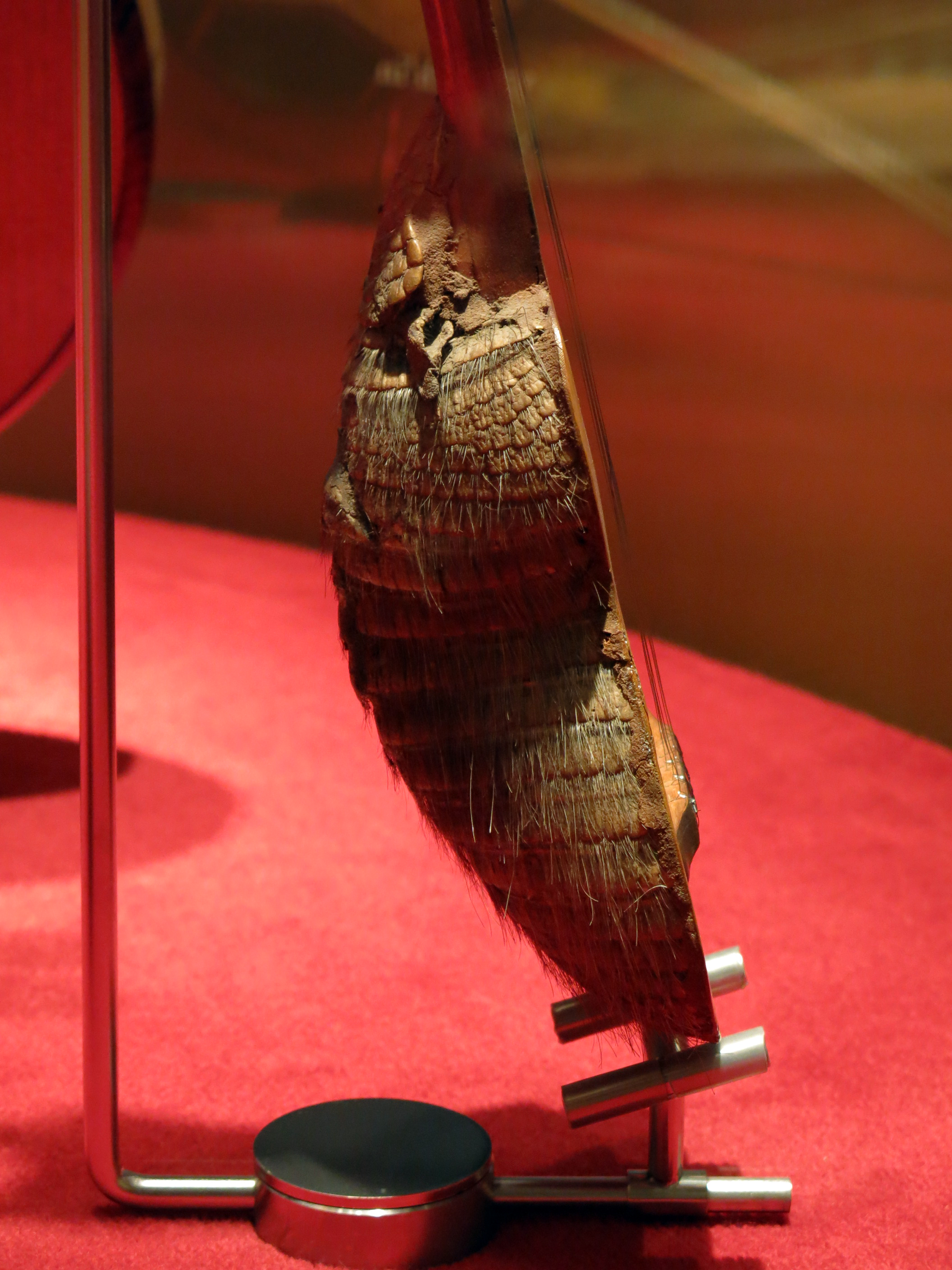 Charango. Bolívia. Primera meitat segle XX. Museu de la Música de Barcelona. (MDMB 935)